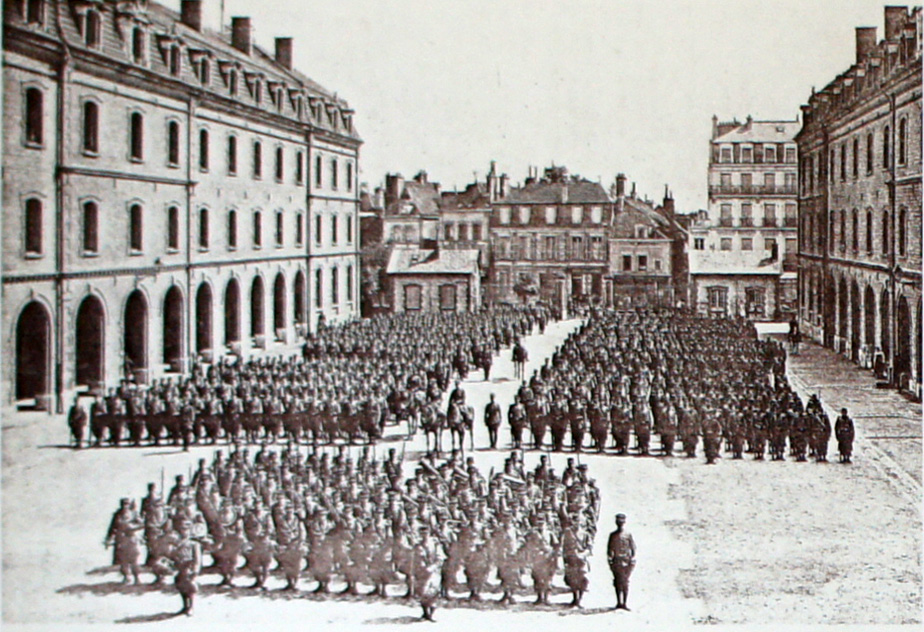 LE 1er_BCP_de_Chaumont,_caserne_Beurnonville .